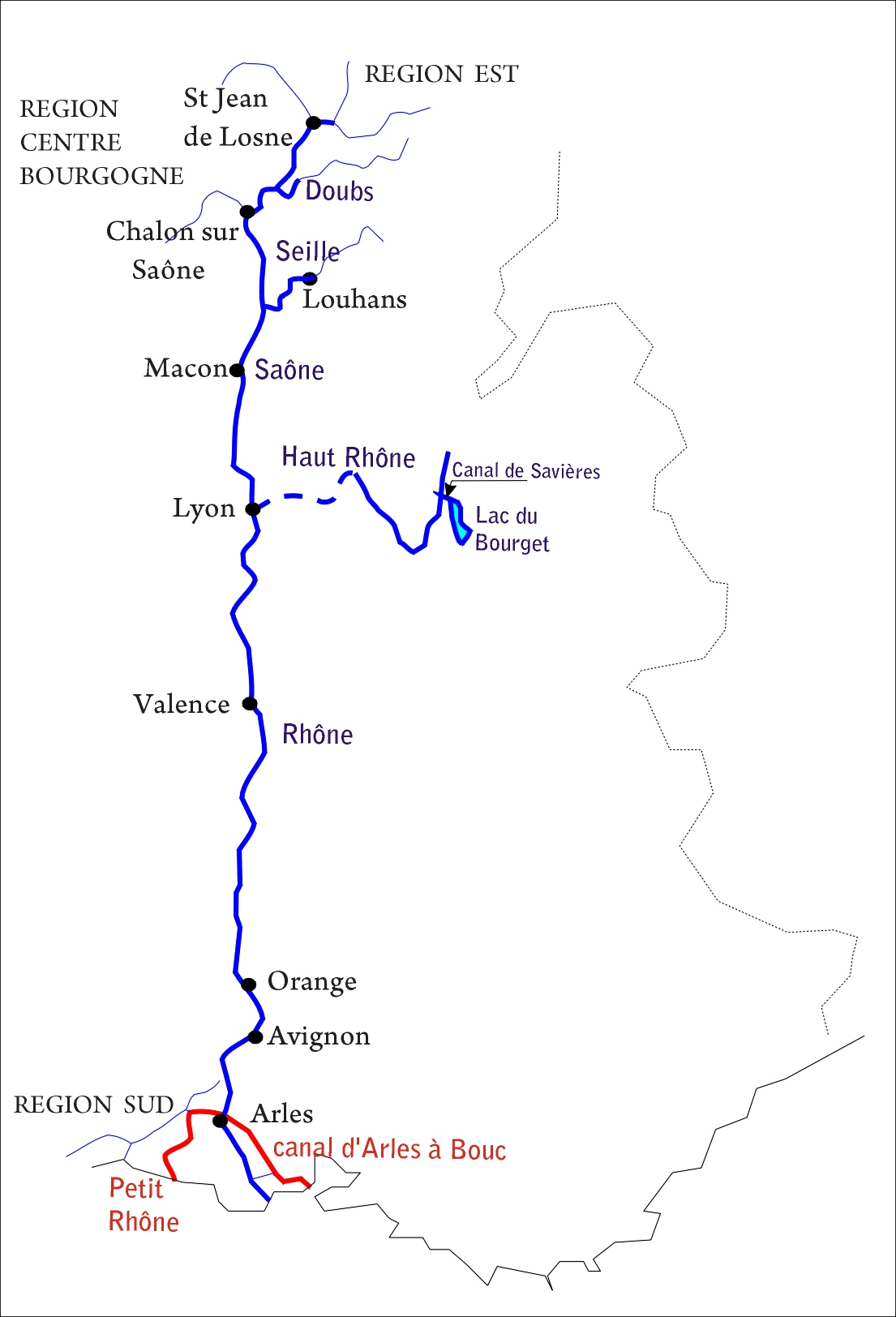 voies navigables. Région Saône Rhône